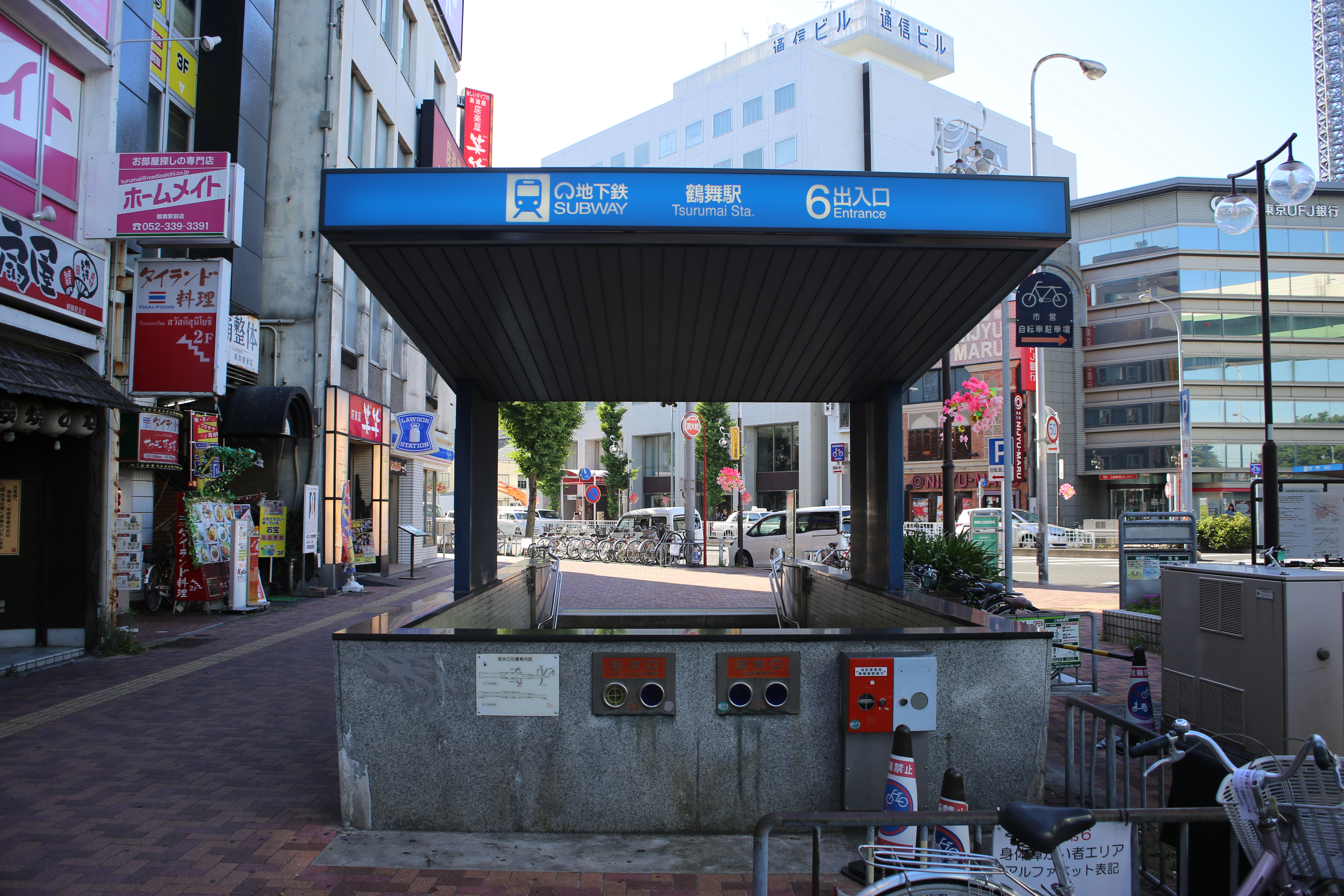 名古屋市営地下鉄鶴舞線鶴舞駅6番出入口